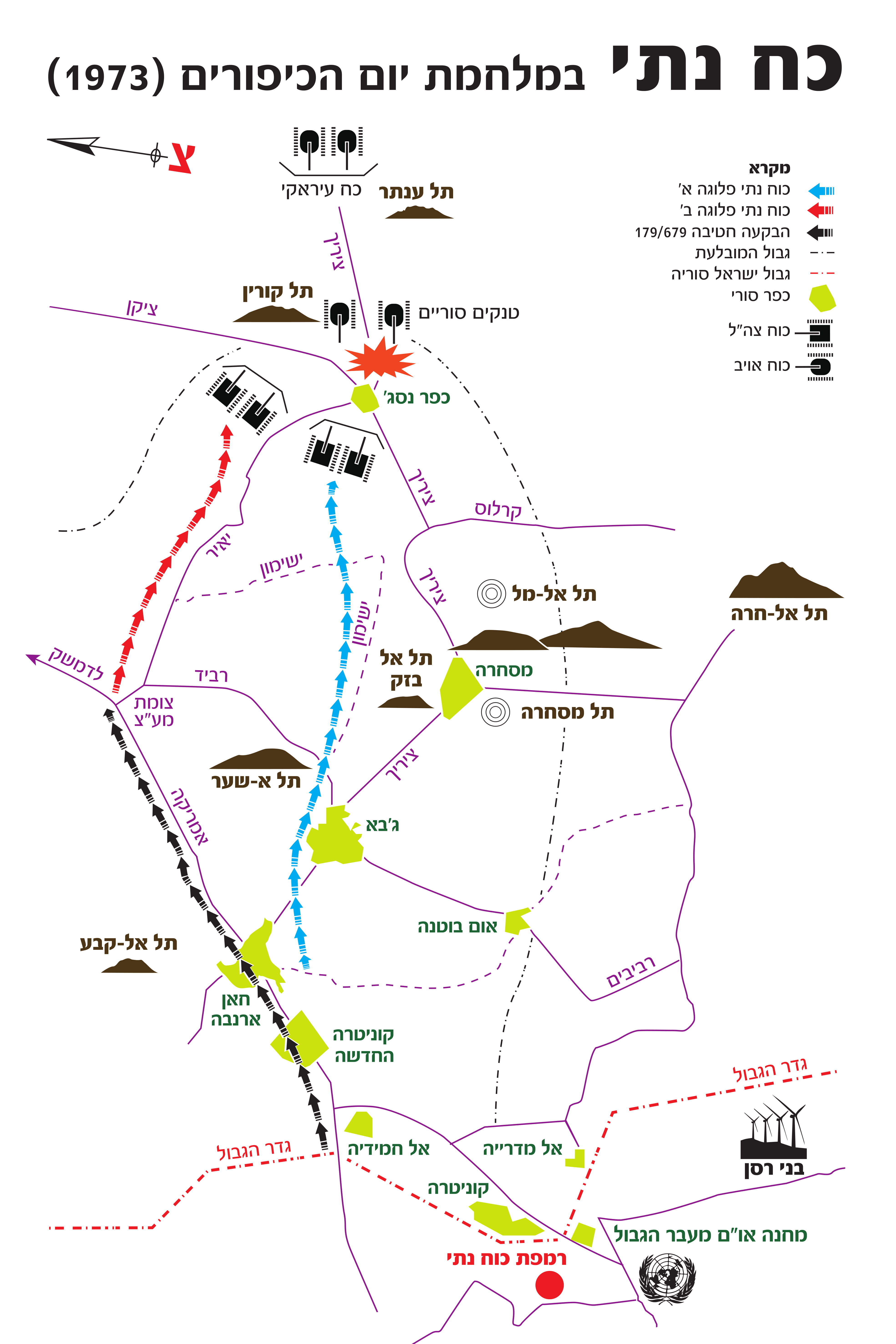 תנועת כוח נתי וההיתקלות במארב במובלעת הסורית ב-12 באוקטובר 1973